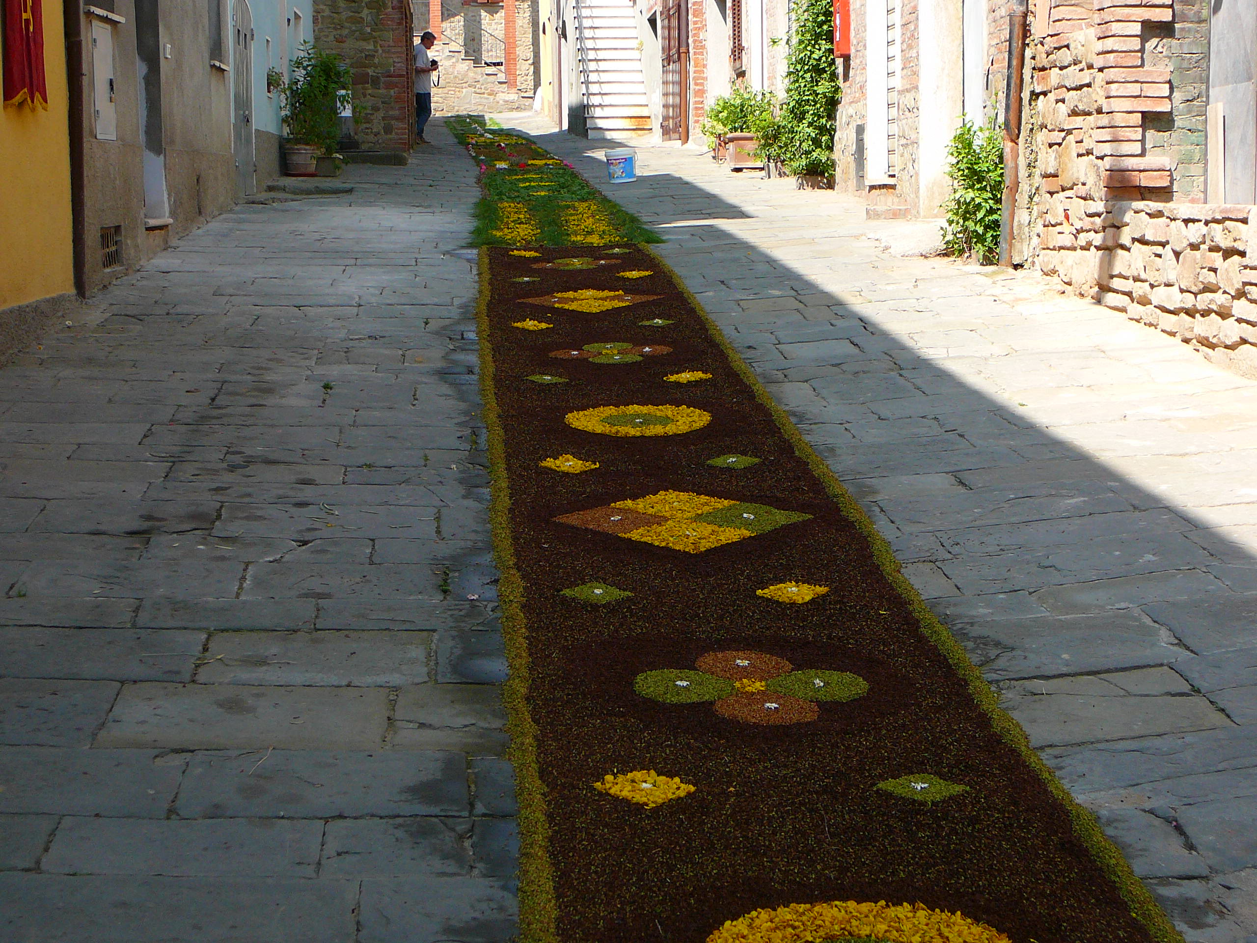 L'infiorata del Corpus Domini a Farnetella (Siena).